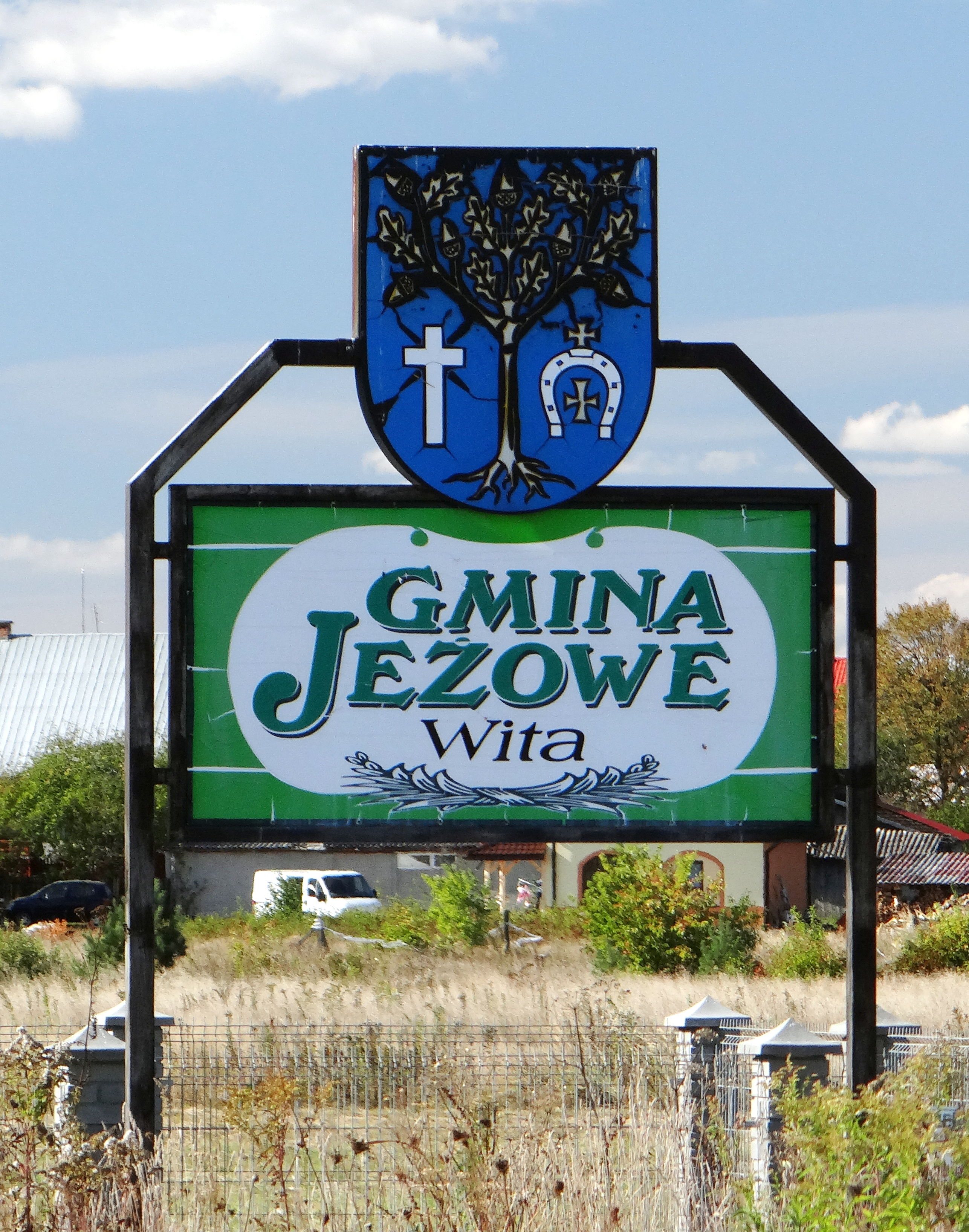 Tablica powitalna "Gmina Jeżowe Wita"